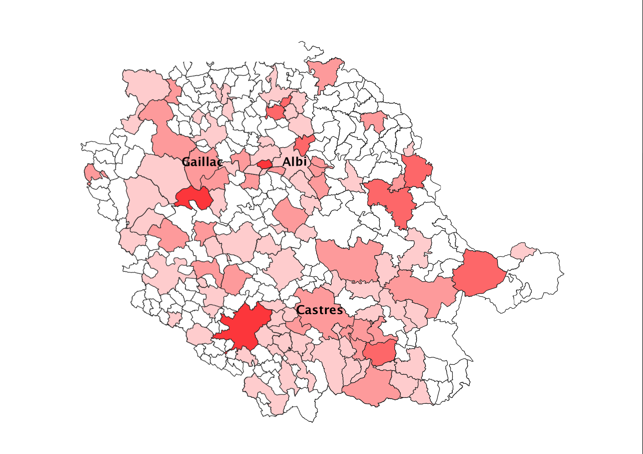 Représentation croissante des proportions de surfaces commerciales par communes dans le département du Tarn par aplats de couleurs gradués.